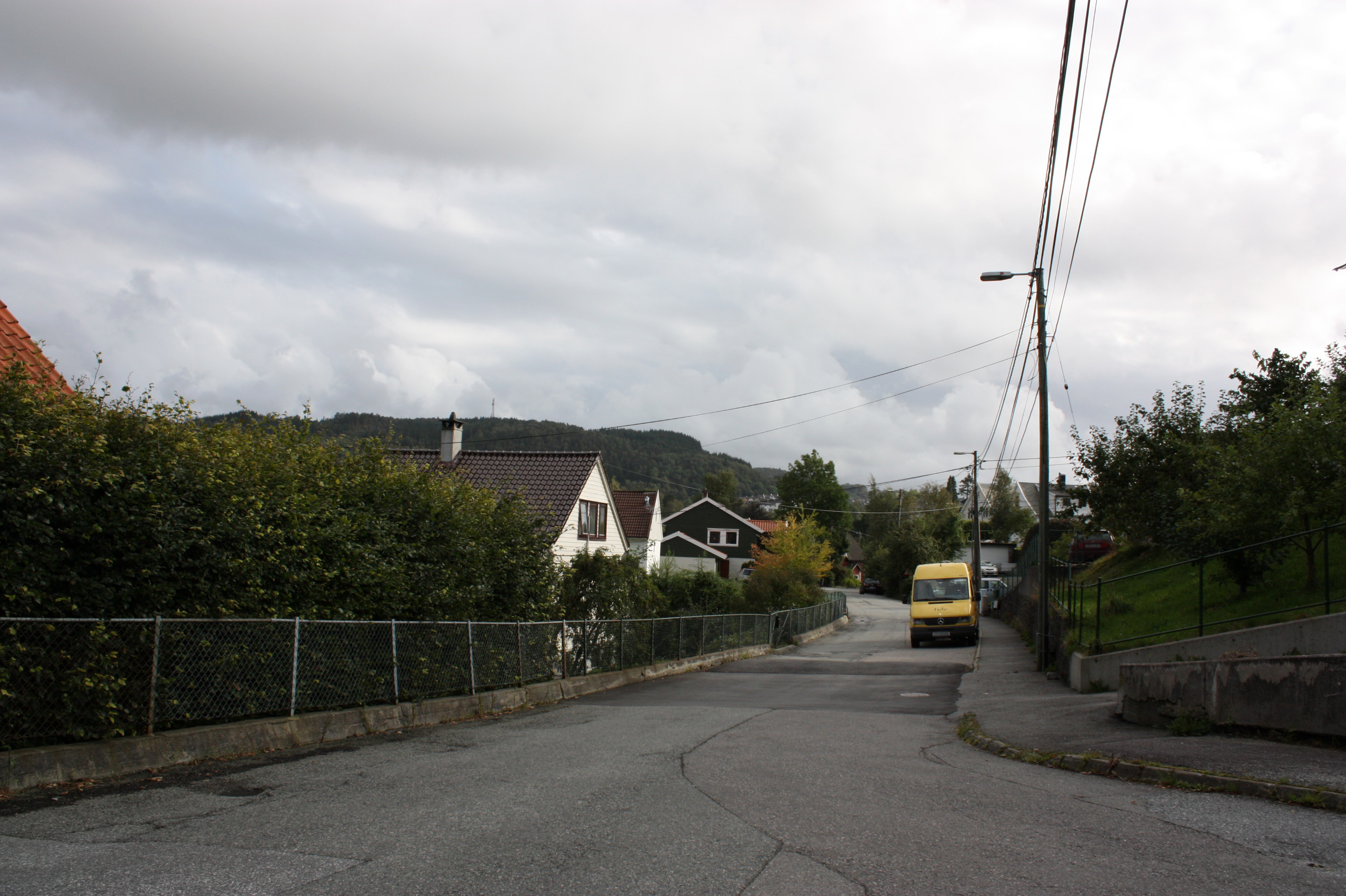 Nesttunbrekka, Fana, Bergen.